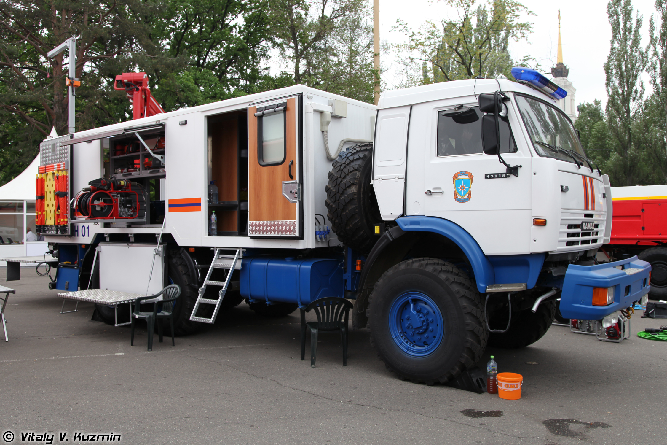 Аварийно-спасательная машина МАВР-58860С "Белый орел-2" (Emergency vehicle MAVR-588560S "White eagle-2")